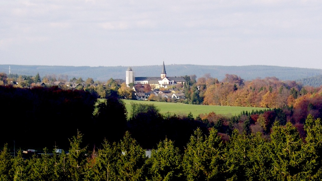 Eifelblick vom Marmagener Aussichtsturm auf das Kloster Steinfeld